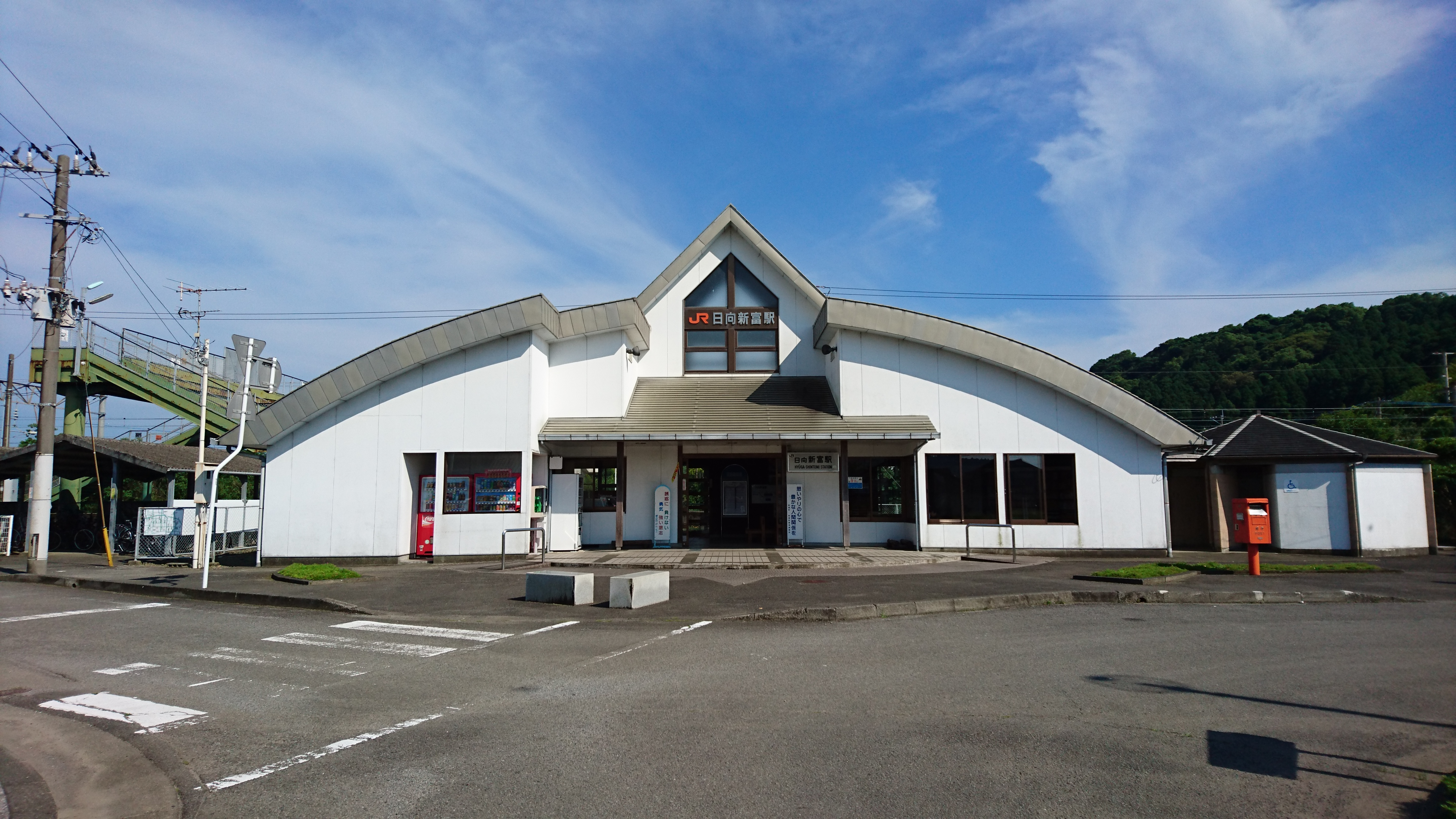 JR九州 日豊本線日向新富駅の駅舎